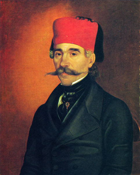 Вук Стефановић Караџић (1787-1864). Урош Кнежевић. уље. 1846.